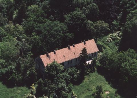 Dunaszentgyörgy, Hungary, aerialphotography